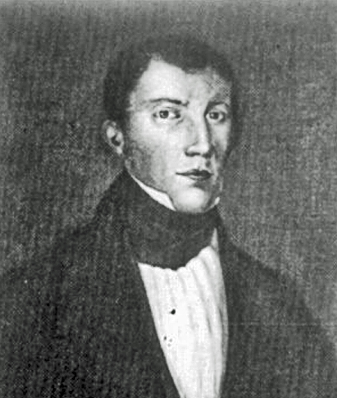 Willem Barend Aalbers, burgemeester en secretaris van Wisch 1838-1846. Detail van schilderij van onbekende maker, daterend van ca. 1840, dus 180 jaar geleden.